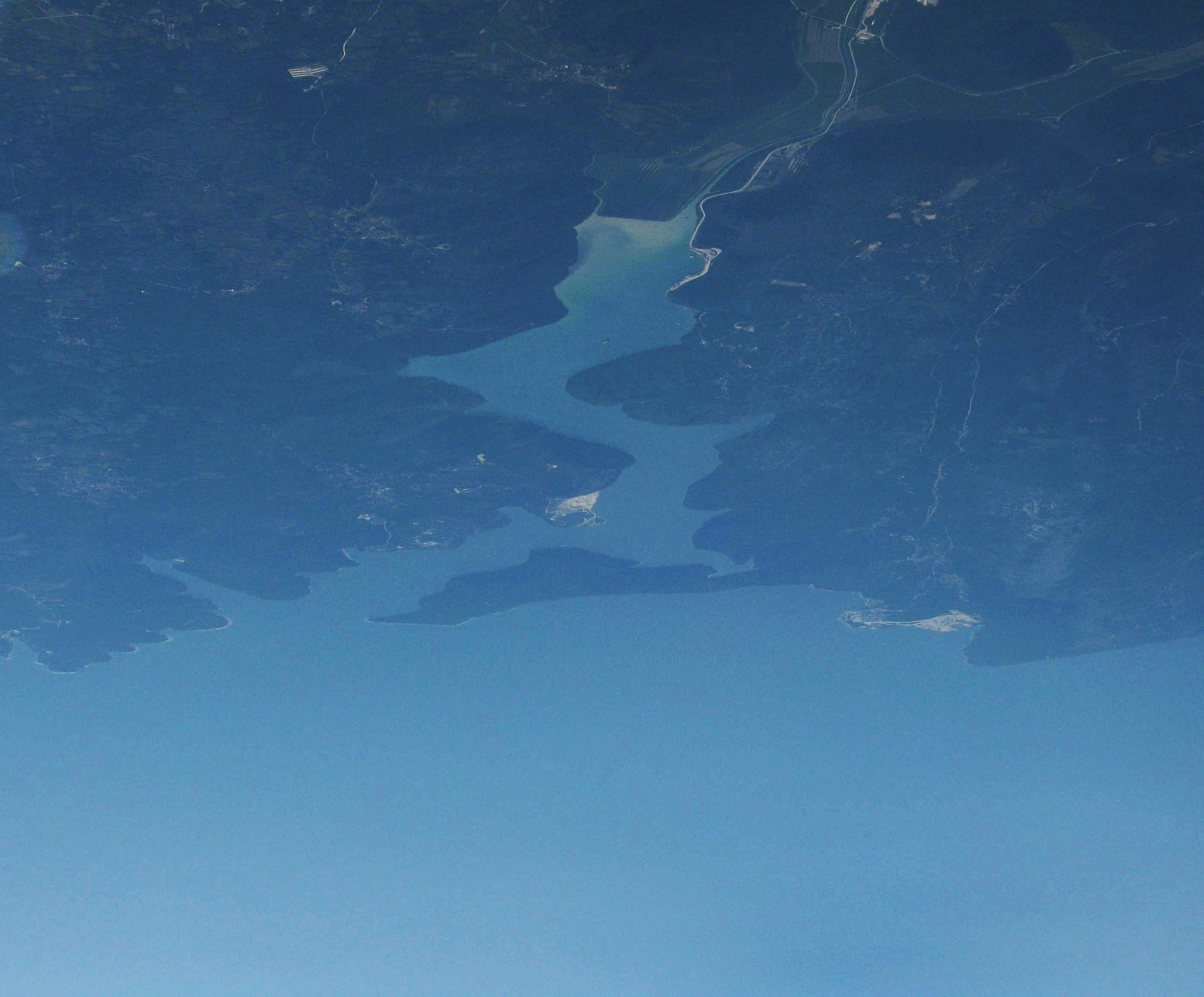 Zaljev Raše u Istri